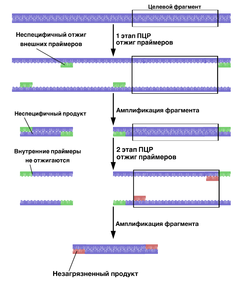 Схема вложенной полимеразной цепной реакции (вложенной ПЦР, гнездовой ПЦР)